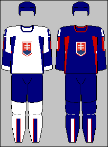 Slovak national team jerseys from Winter Olympic Games 2006 and World Championship 2006